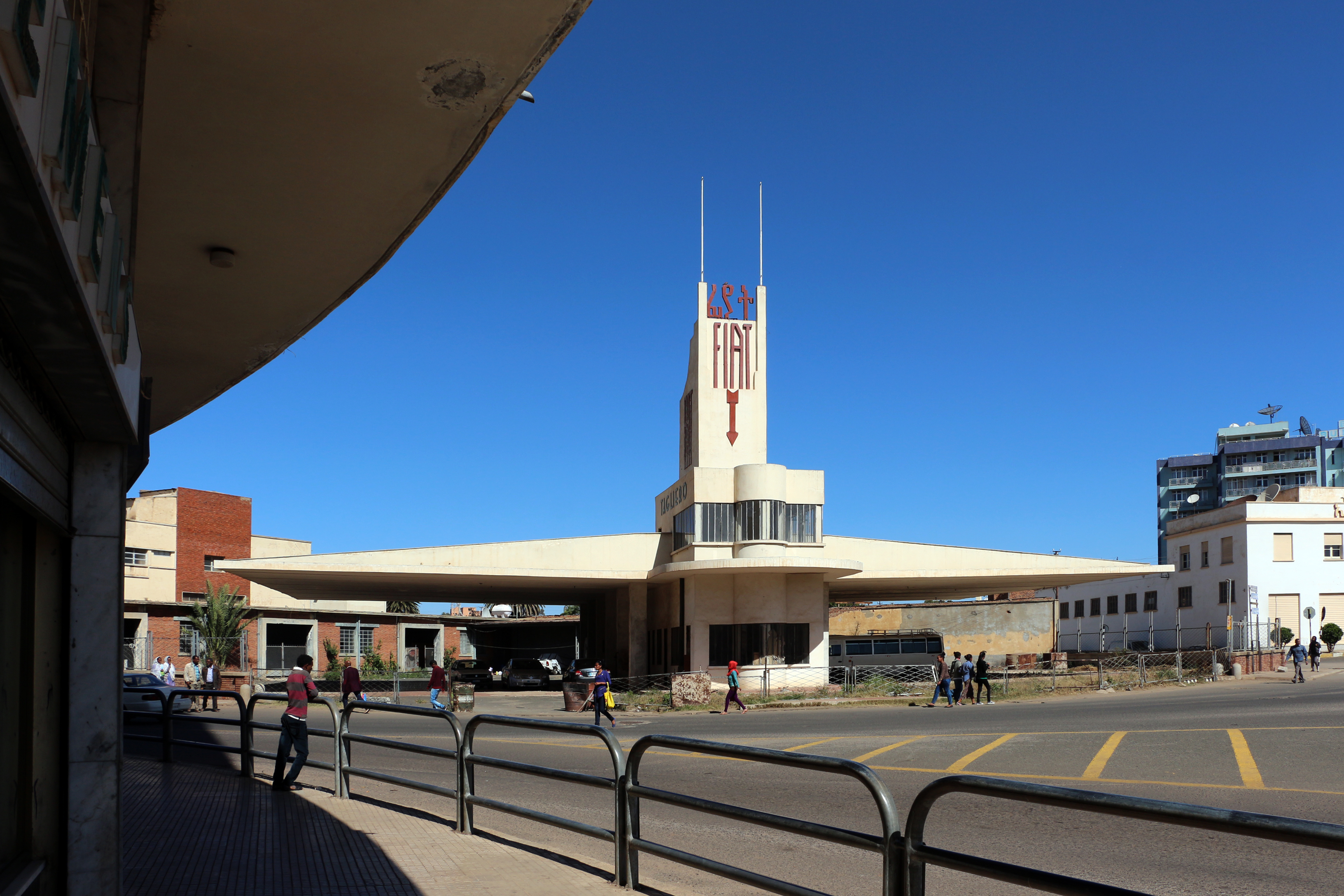 Fiat tagliero, 00.JPG